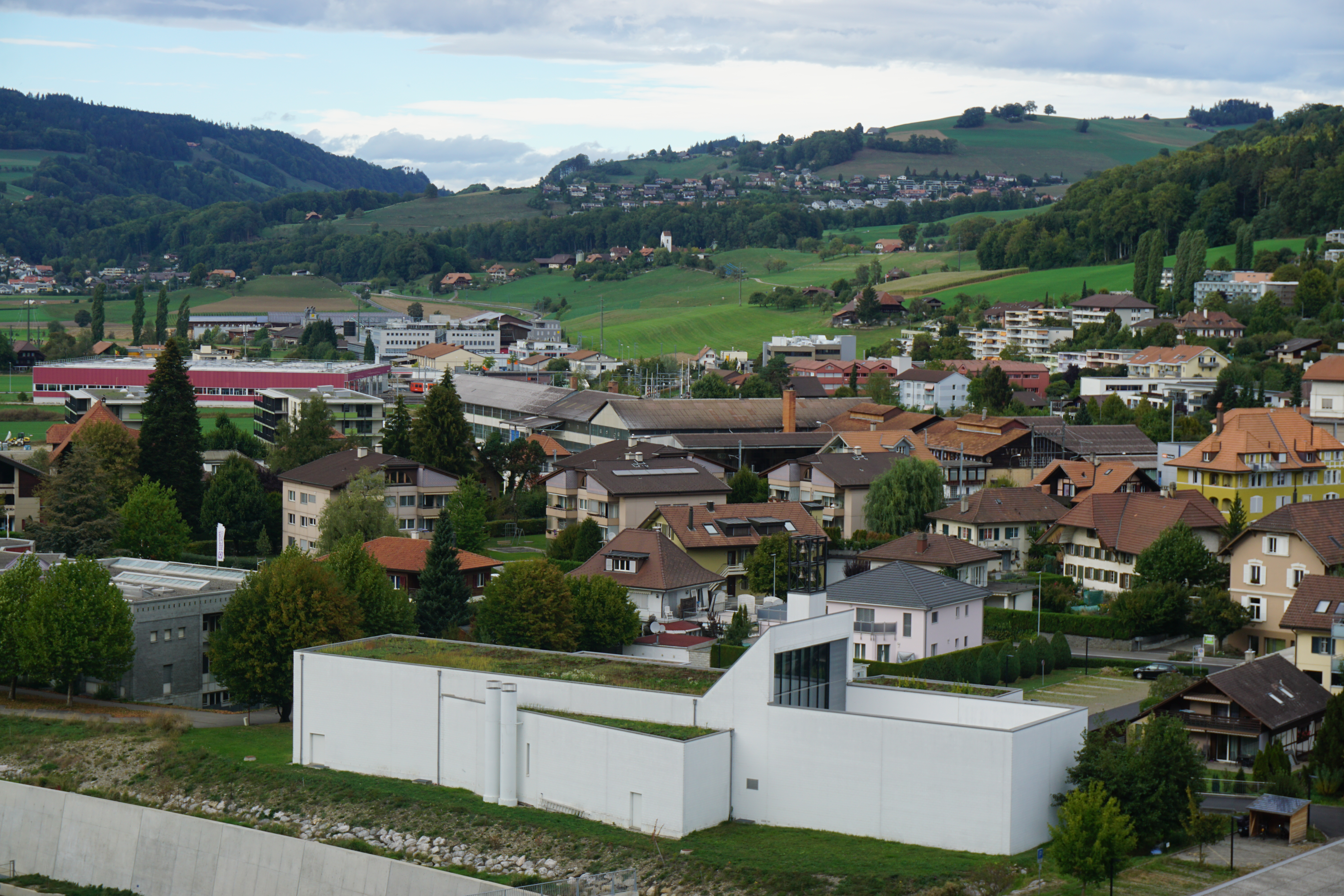 St. Martin, Übersicht vom Wislenhang